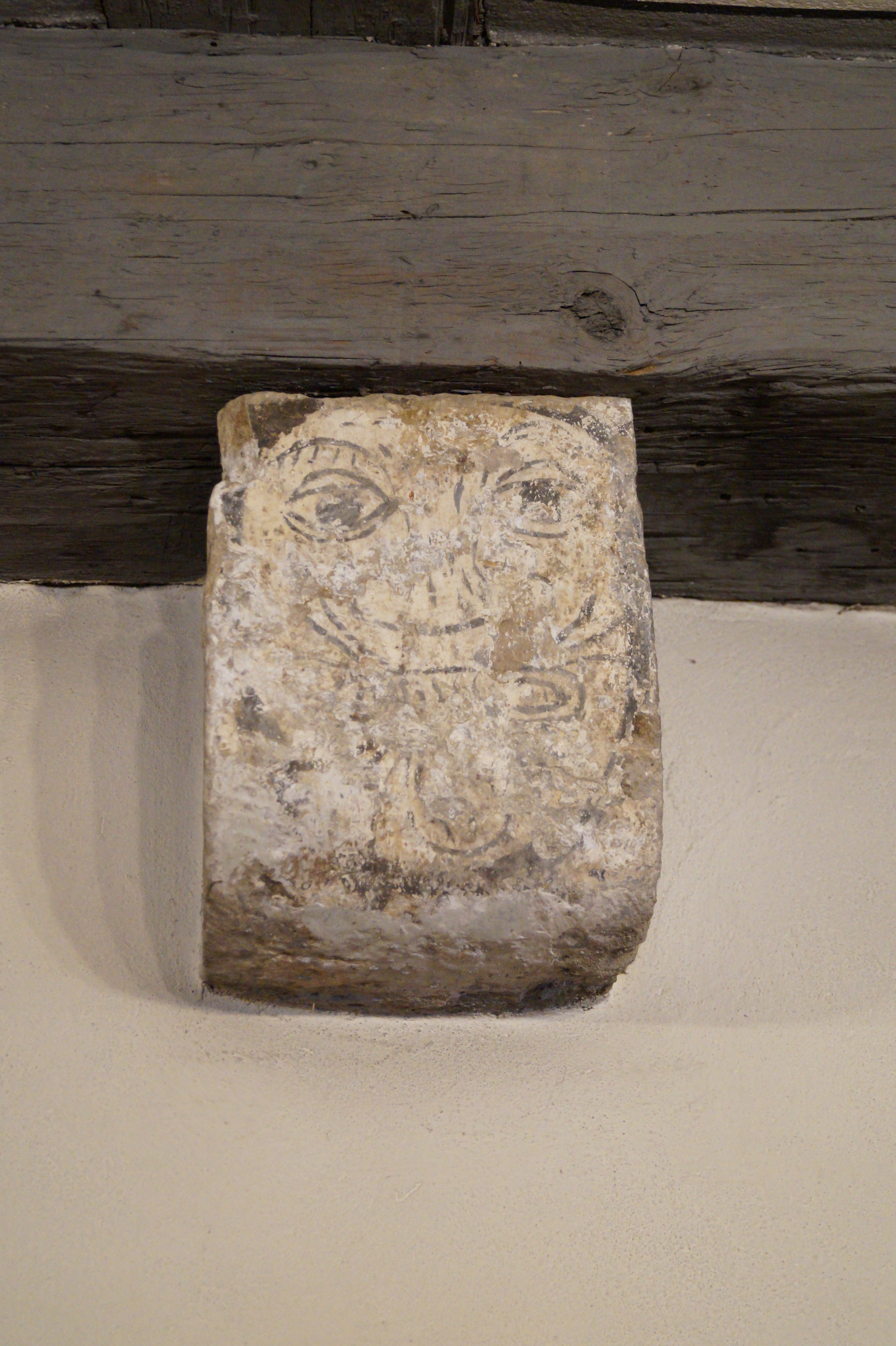 Romanisches Haus in Seligenstadt, Innenraum im Obergeschoss, Konsolstein mit Spottkopf